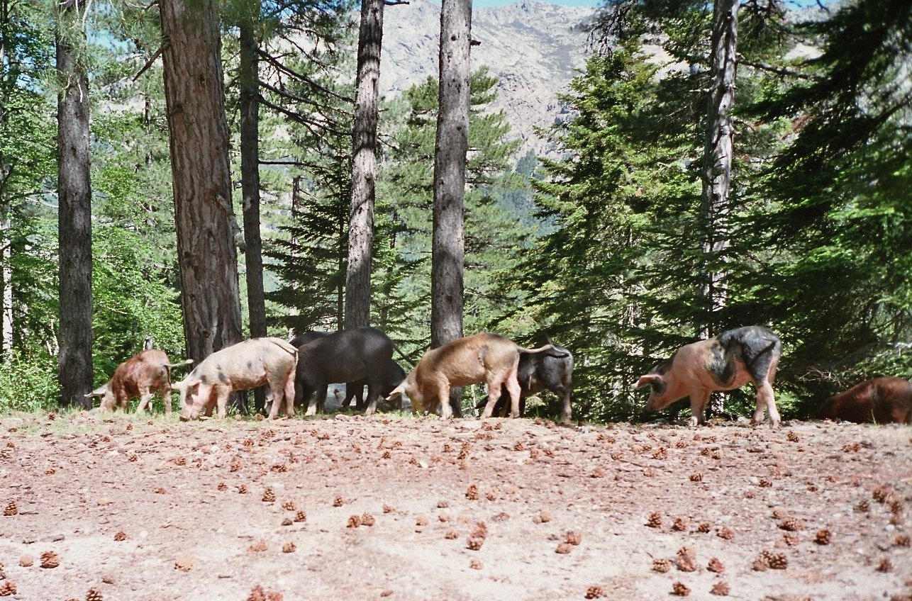 Einige halbwilde Schweine der Insel Korsika, eigenes Bild